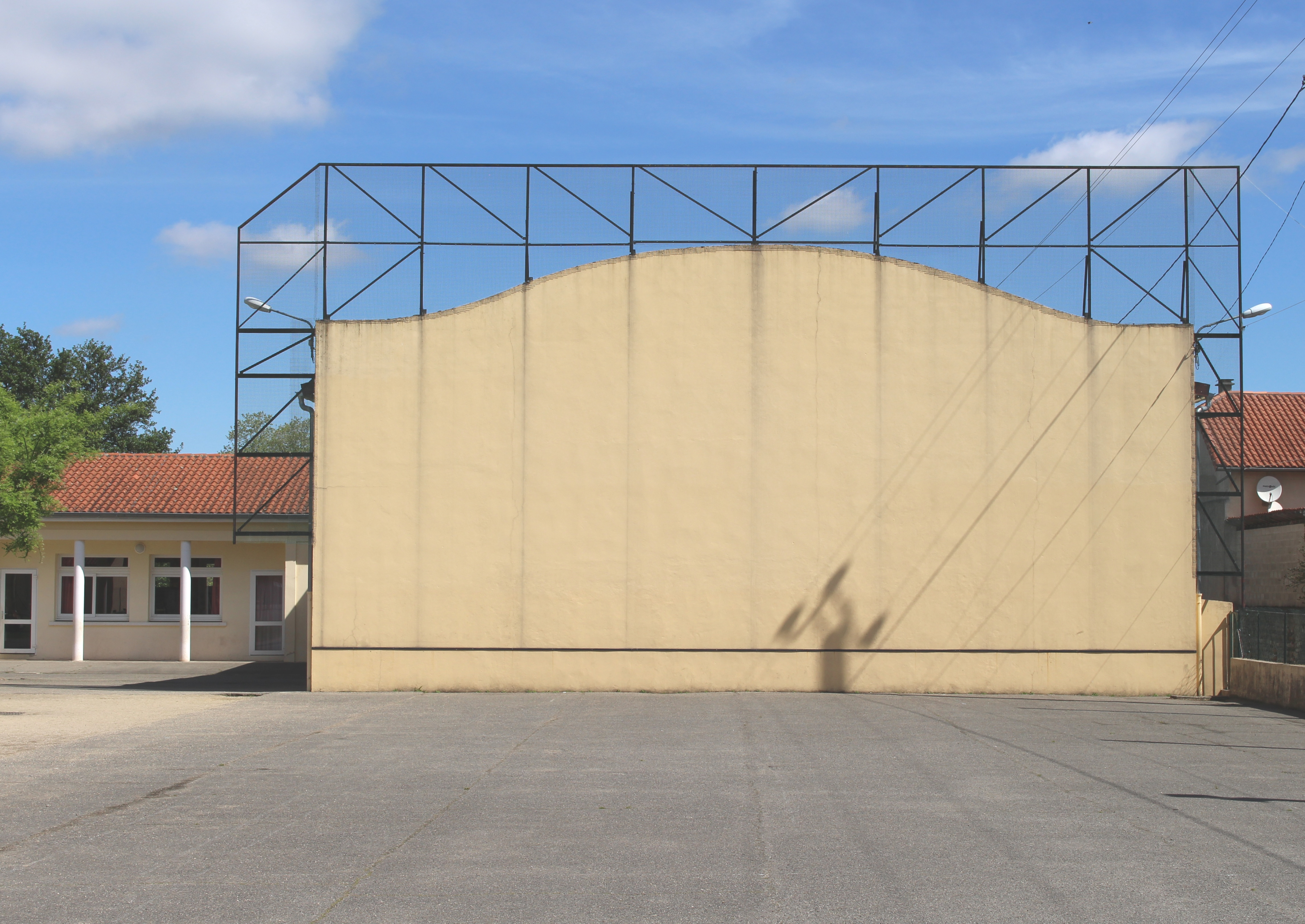 Fronton de Bernac-Debat (Hautes-Pyrénées)